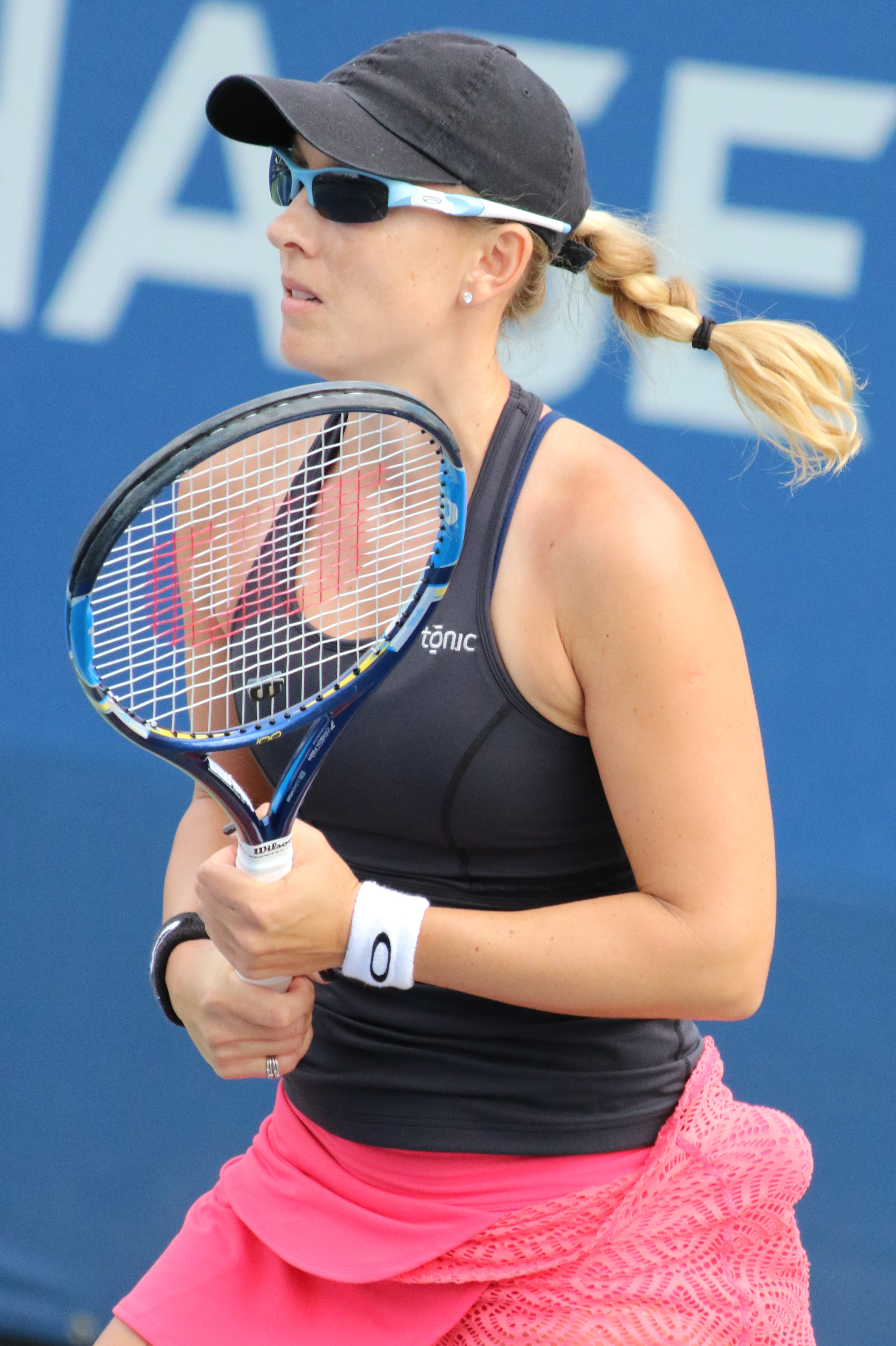 Rodionova An. US16 (3)